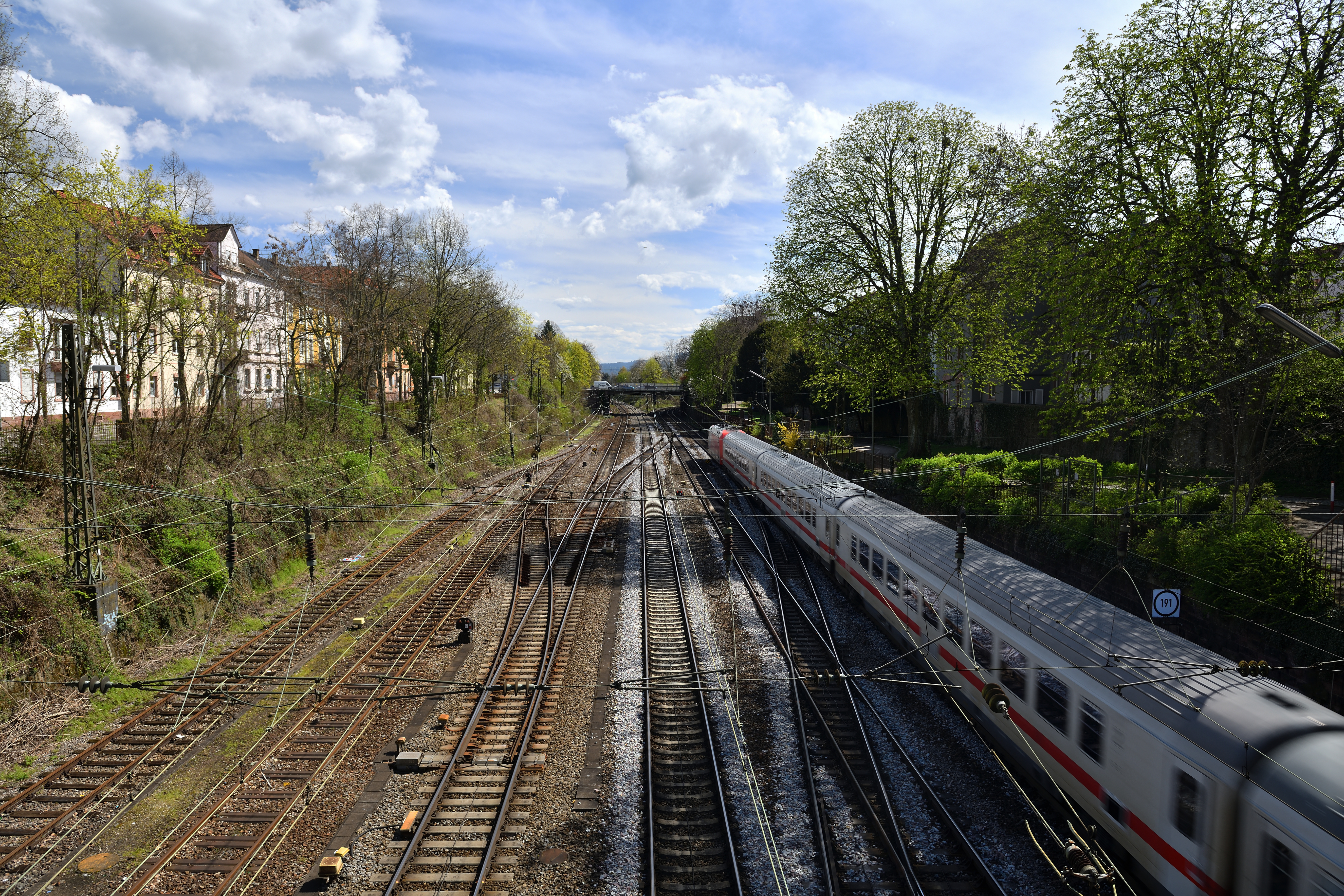 Offenburg: Bahntrasse durch die Stadt